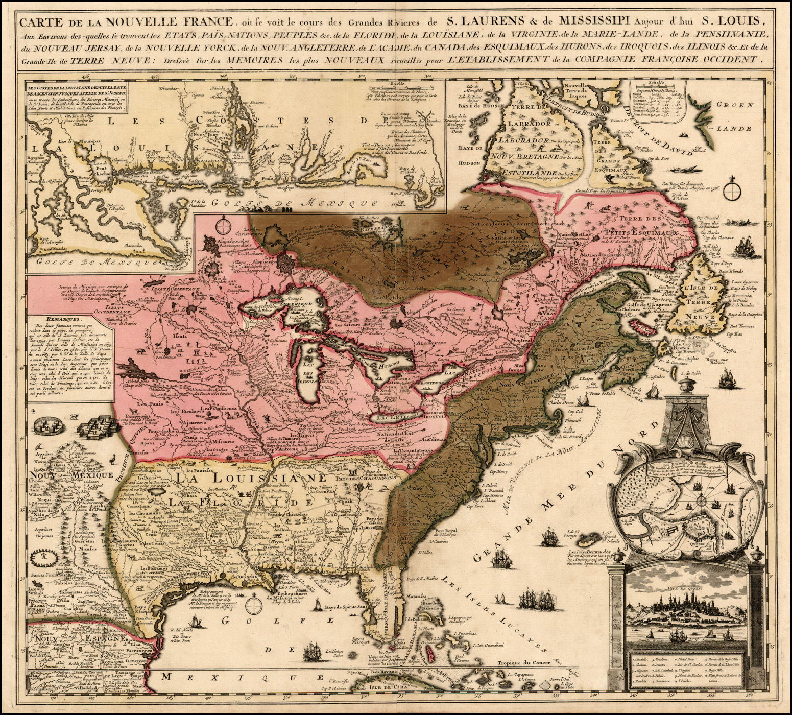 Carte de la Nouvelle-France, où se voit le cours des grandes rivières de S. Laurens & de Mississipi aujourd'hui S. Louis, aux environs des-quelles se trouvent les états, païs, nations, peuples etc. de la Floride, de la Louisiane, de la Virginie, de la Marie-Lande, de la Pensilvanie, du Nouveau-Jersay, de la Nouvelle Yorck, de la Nouv. Angleterre, de l'Acadie, du Canada, des Esquimaux, des Hurons, des Iroquois, des Illinois etc. et de la grande île de Terre Neuve, dressée sur les memoires les plus nouveaux recueillis pour l'établissement de la Compagnie françoise occident. Faite à Amsterdam, 1719